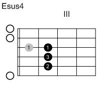 Eigenanfertigung